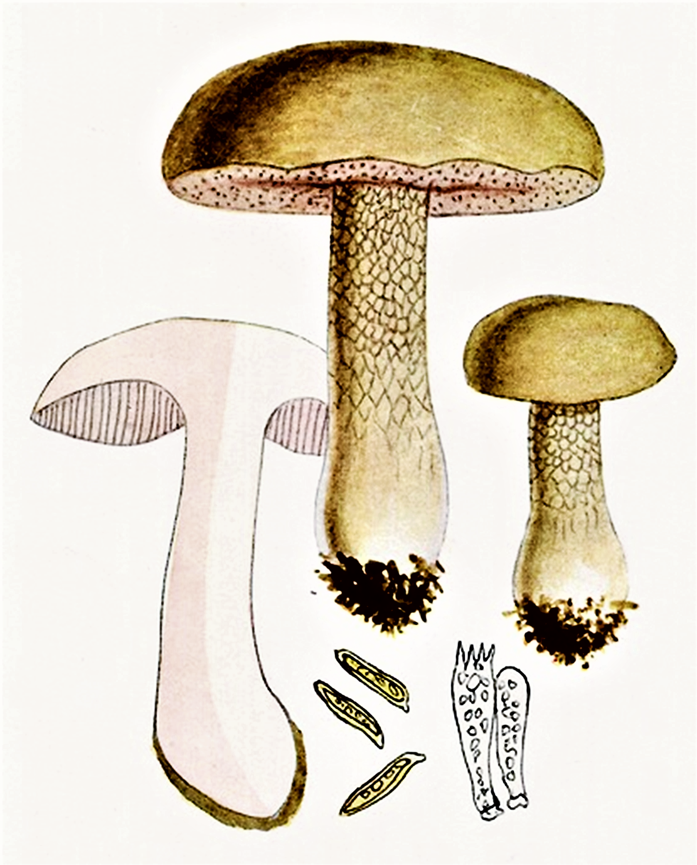 Giacomo Bresadola: Boletus felleus Bull. (1788), heute Tylopilus felleus P.Karst. (1881)